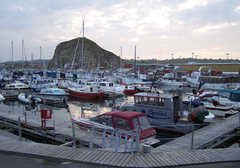 Marina de Cap-aux-Meules avec le cap en arrière-plan, aux Îles-de-la-Madeleine.